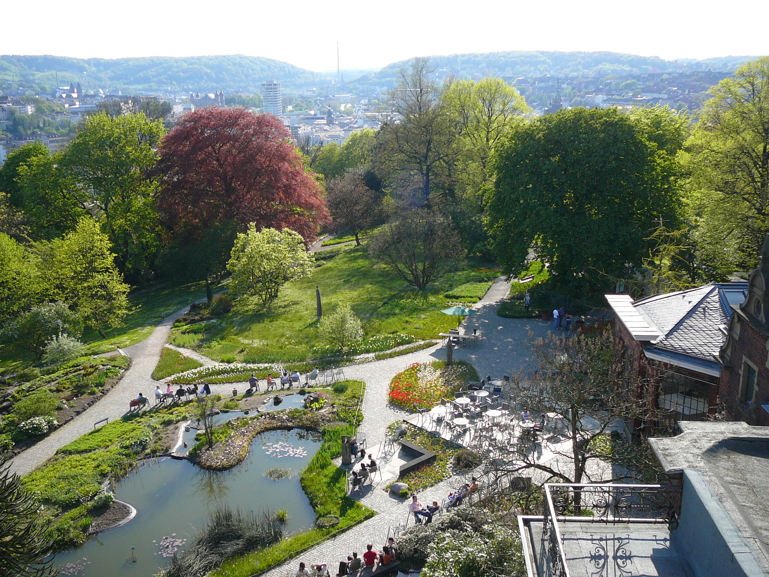 Hardt-Anlagen, Wuppertal